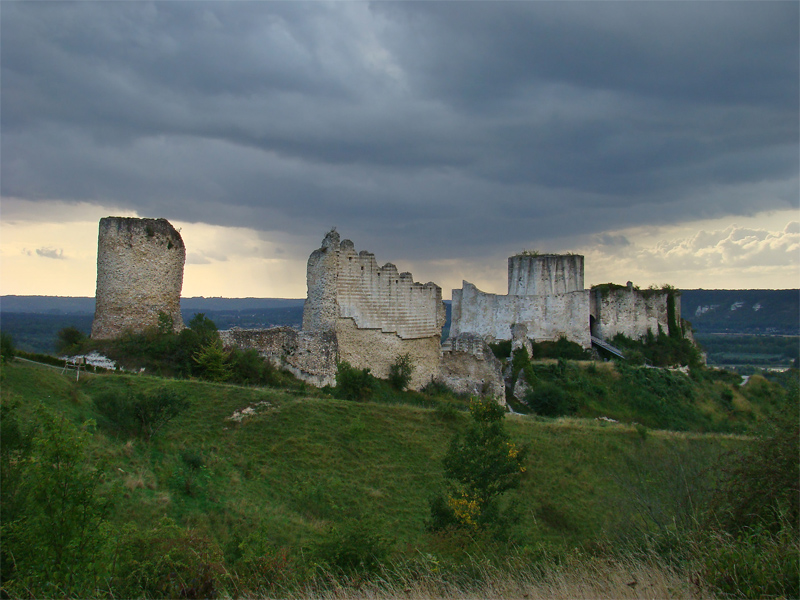 Château-Gaillard, Les Andelys, Eure, Normandie, France.